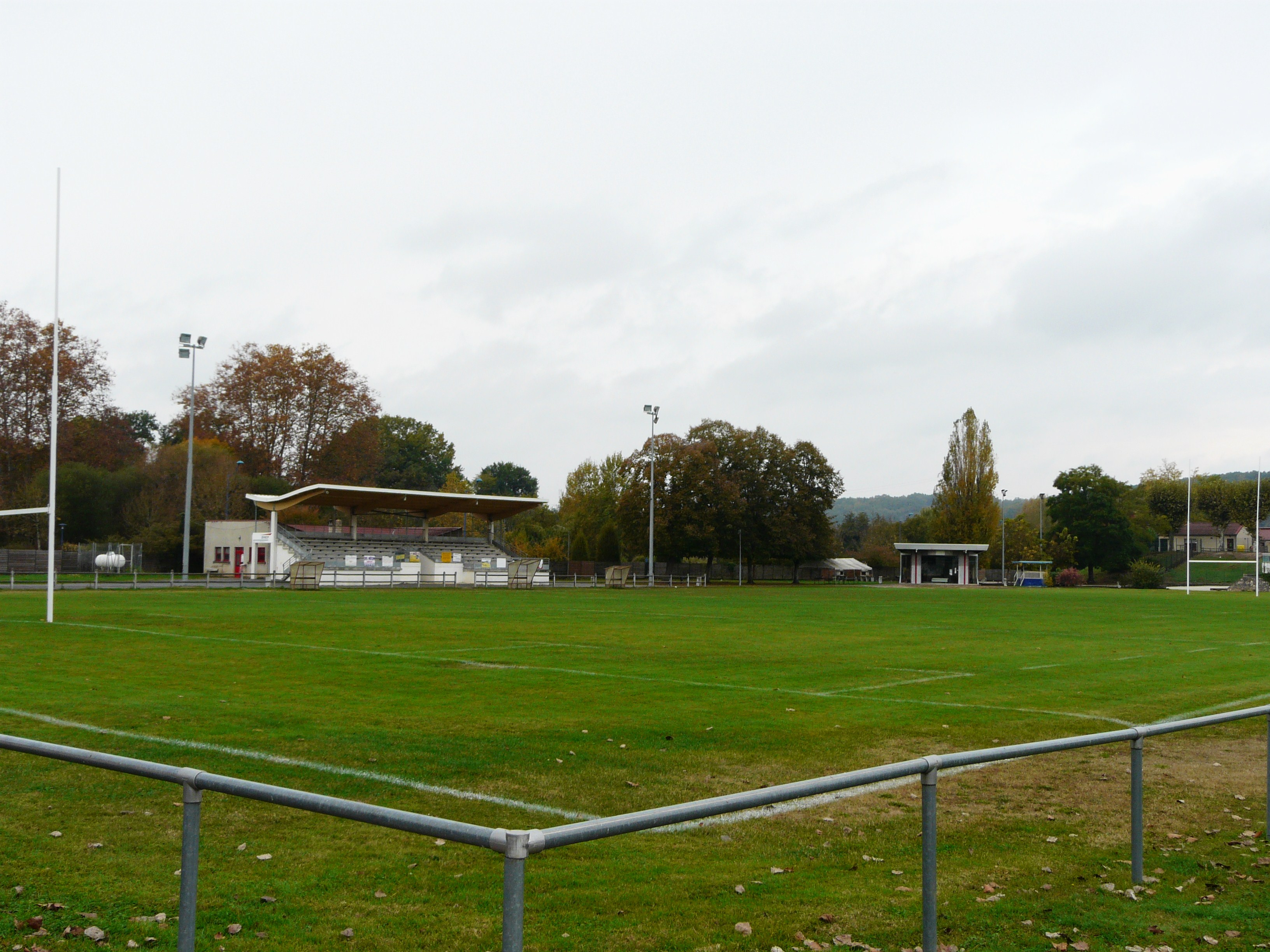 Le stade Maurice-Lacoin, Périgueux, Dordogne, France.